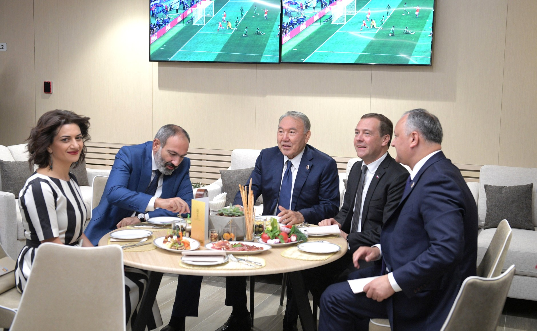 В перерыве матча Президент России Владимир Путин кратко пообщался с иностранными гостями, прибывшими на Чемпионат мира по футболу 2018 года